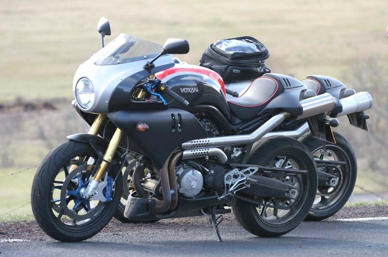 Voxan Charade Racing. Tirée du site : mail d'autorisation en page de discussion de l'article Voxan Charade